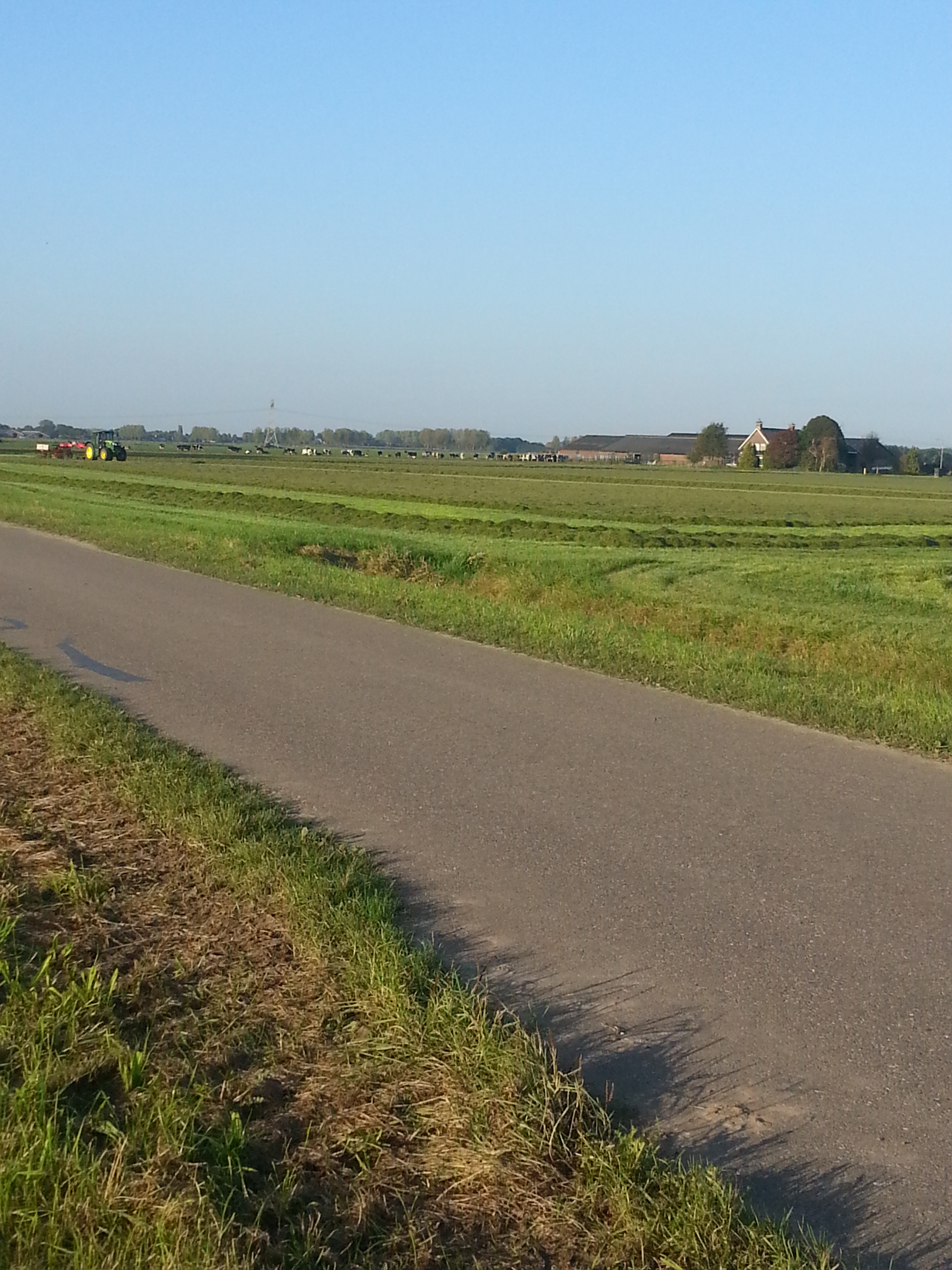 Uitzicht vanuit polder op Voordijk van Vlijmen